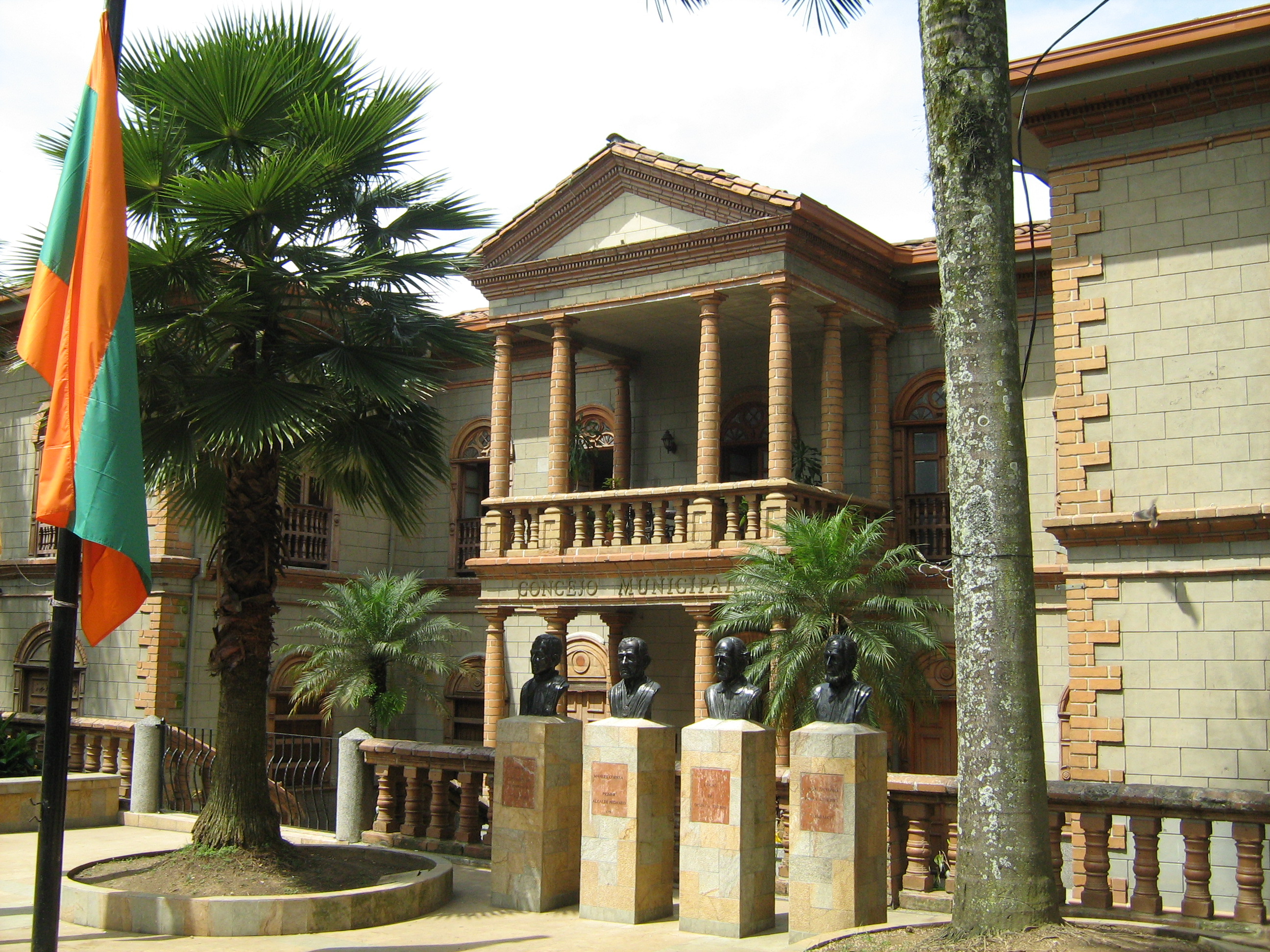 Edificio del Concejo Municipal de Envigado, Colombia.